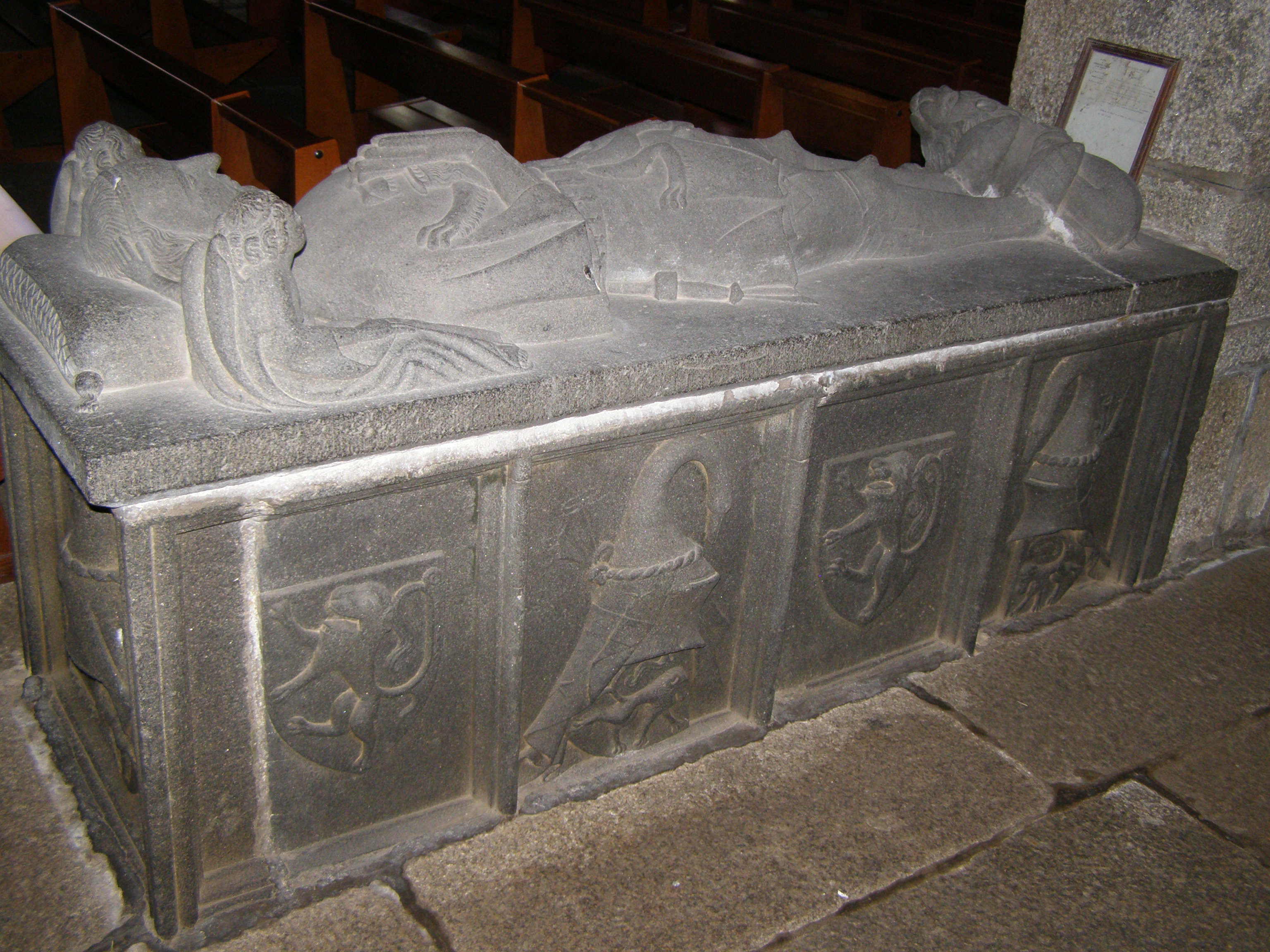 Tombeau de Jean de Kerouzeré (+ 1460) église de Sibiril, Bretagne.